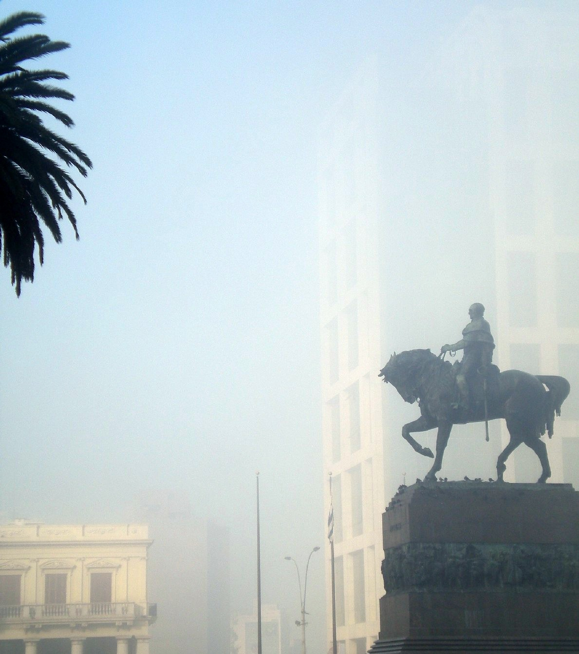 Mausoleo del General José Artigas. Ubicada en el departamento de Montevideo